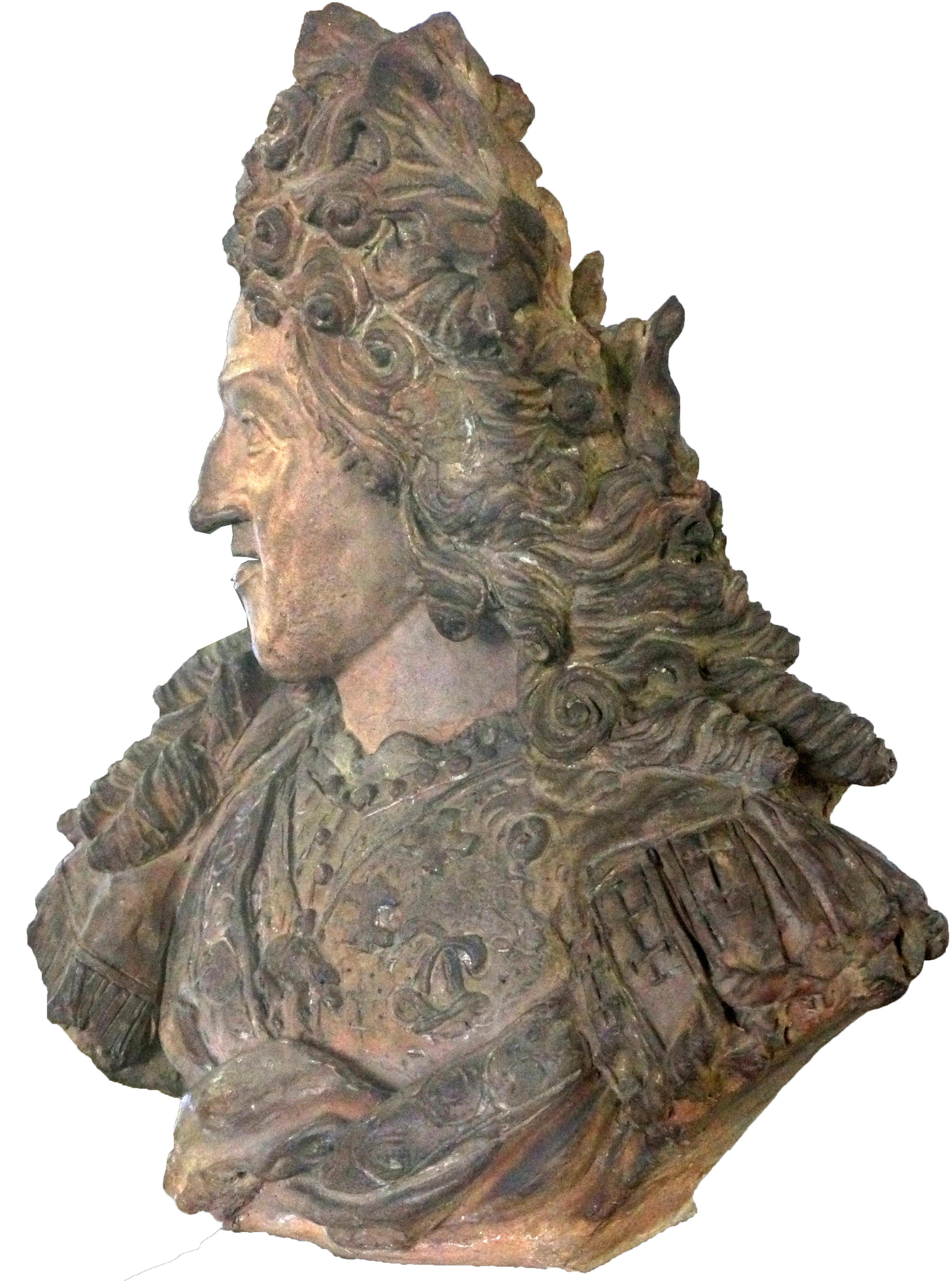 Présenté au Musée Lorrain.